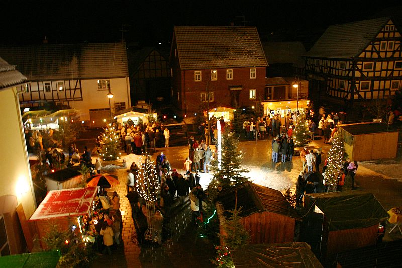 Weihnachtsmarkt Großenlüder